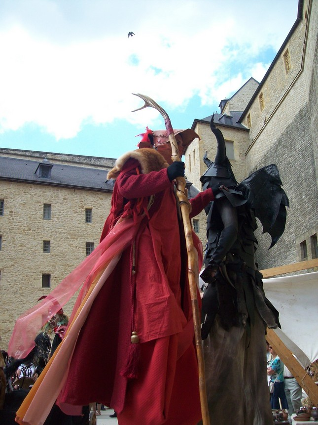 16ème festival (22 mai 2011). Le Château-fort de Sedan abritera son 17ème festival médieval les 19 et 20 mai 2012.